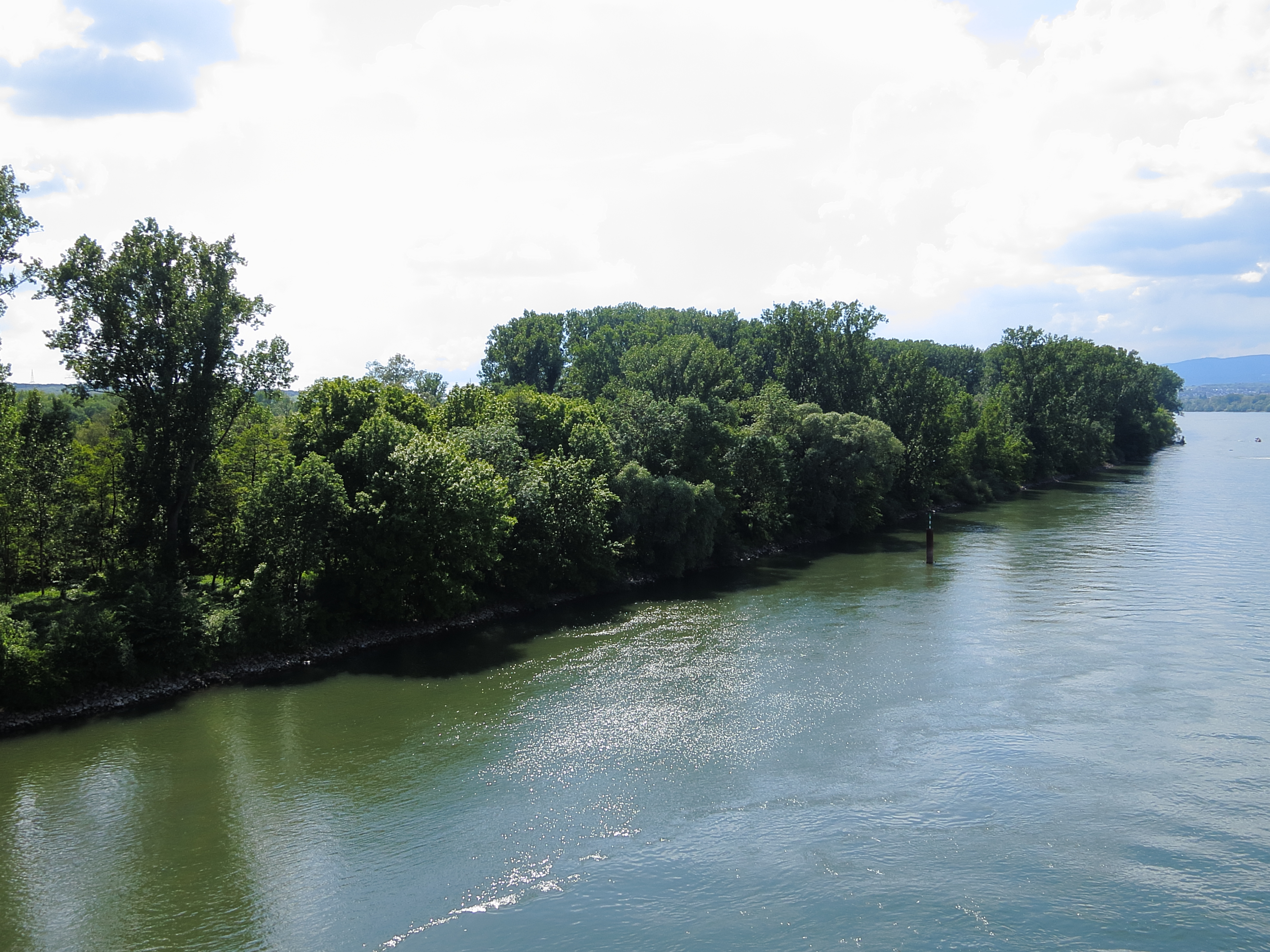 (NSG:RP-7315-053)_Mombacher Rheinufer Blick von der Schiersteiner Brücke aus auf die Wasserseite des NSG Mombacher Rheinufer